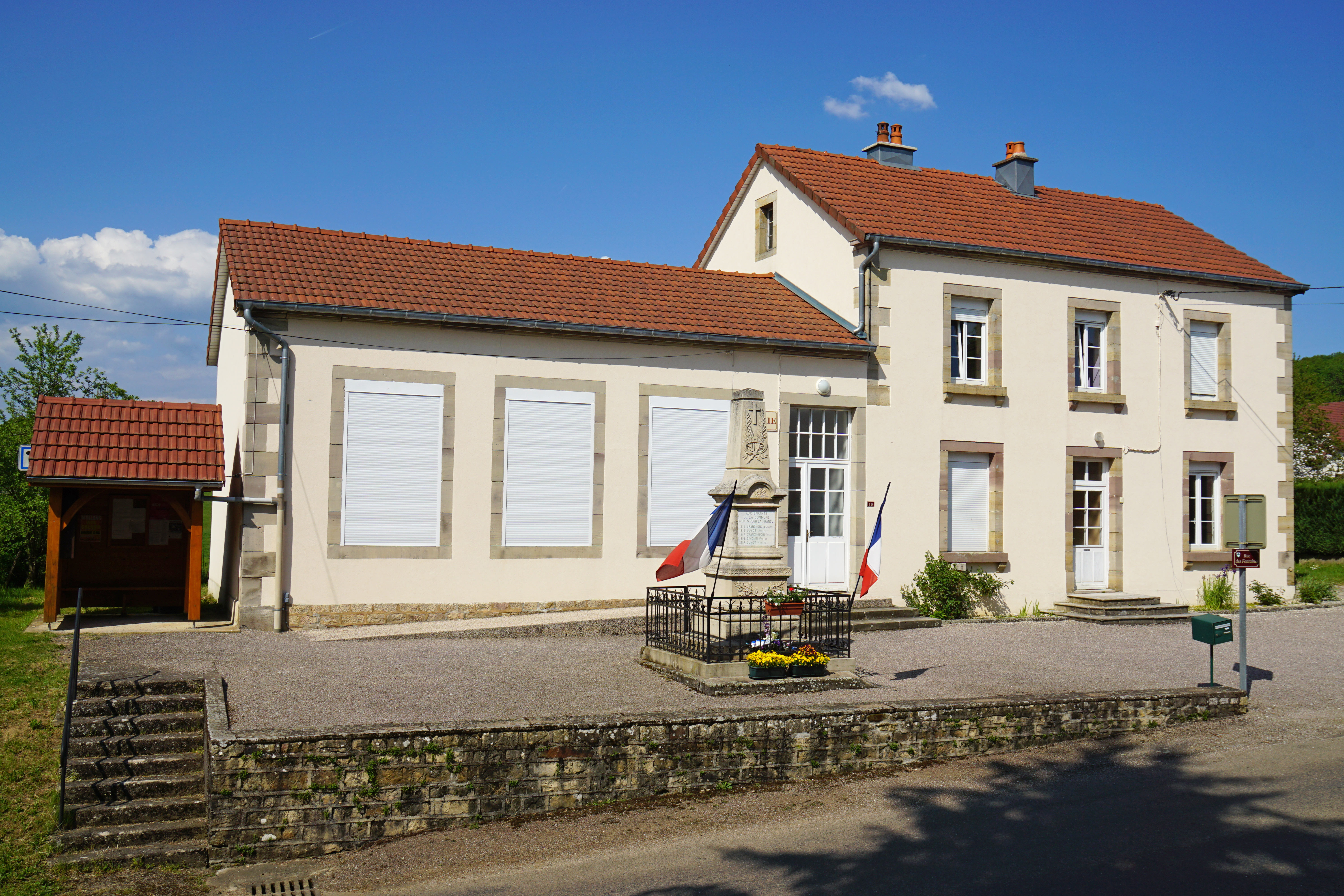 Mairie de Châteney.